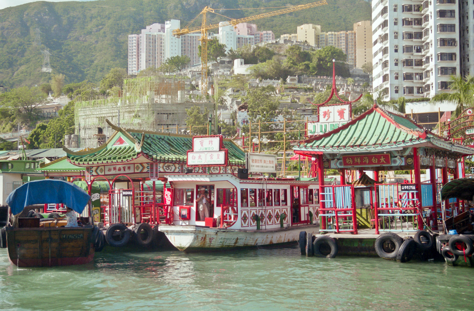 Aberdeen Restaurant Boats